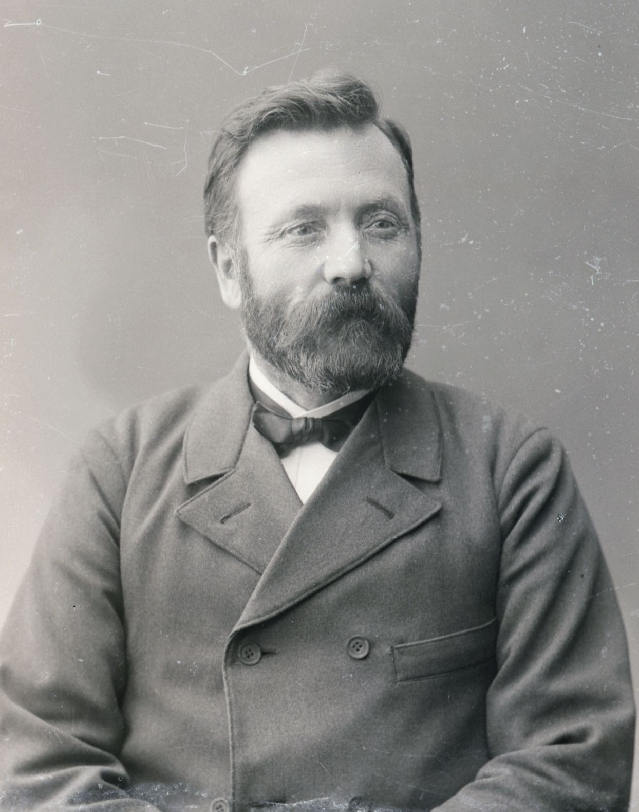 Norsk (bokmål): Andreas Galtvik, offisielt portrett fra Stortinget.